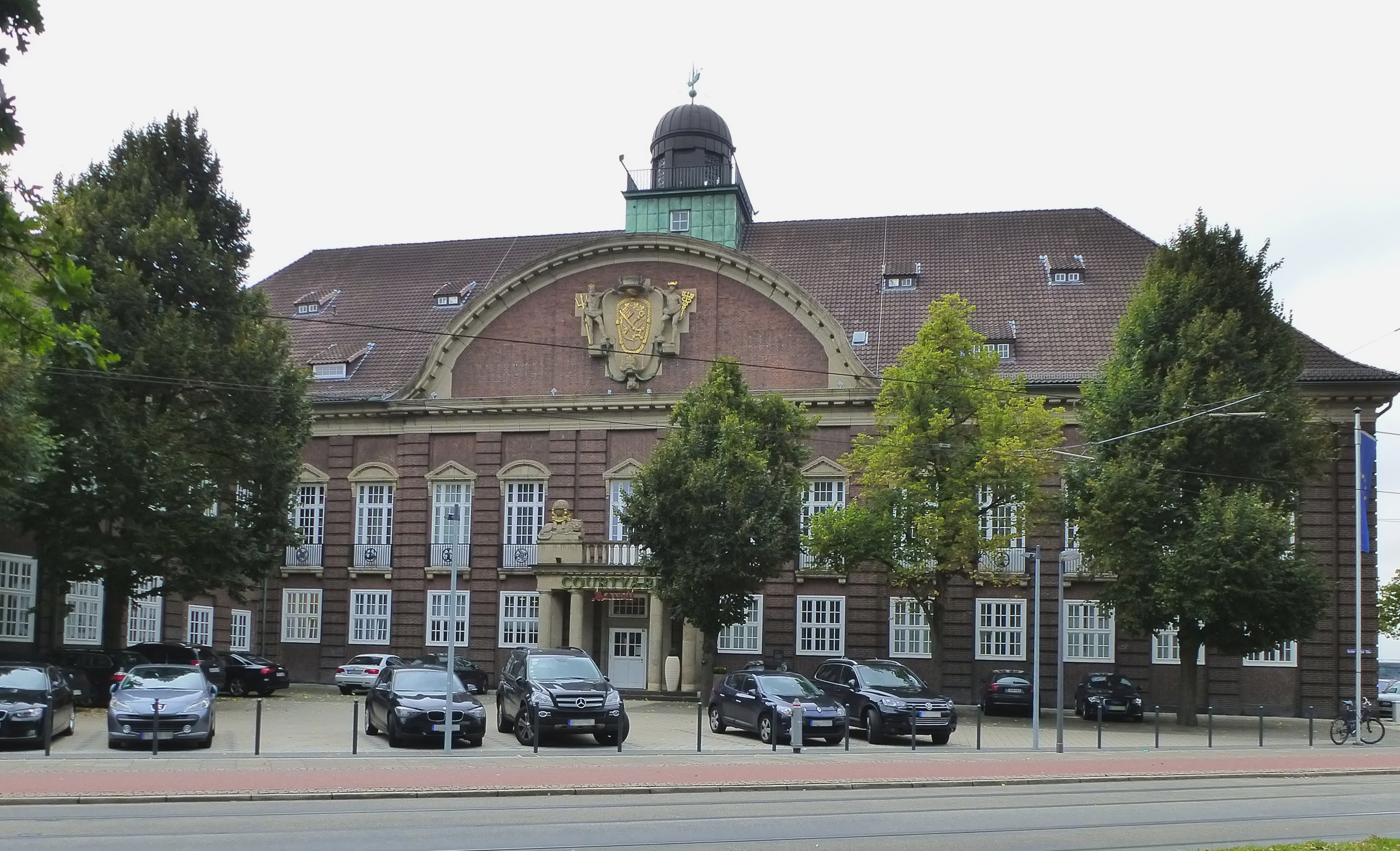 Lloyd-Bahnhof, Gepäckabteilung und Auswandererbahnhof des Norddeutschen Lloyd in Bremen, Gustav-Deetjen-Allee 2Das abgebildete Objekt ist ein geschütztes Kulturdenkmal in der Freien Hansestadt Bremen, mit der Nr. 1243 beim Landesamt für Denkmalpflege registriert.